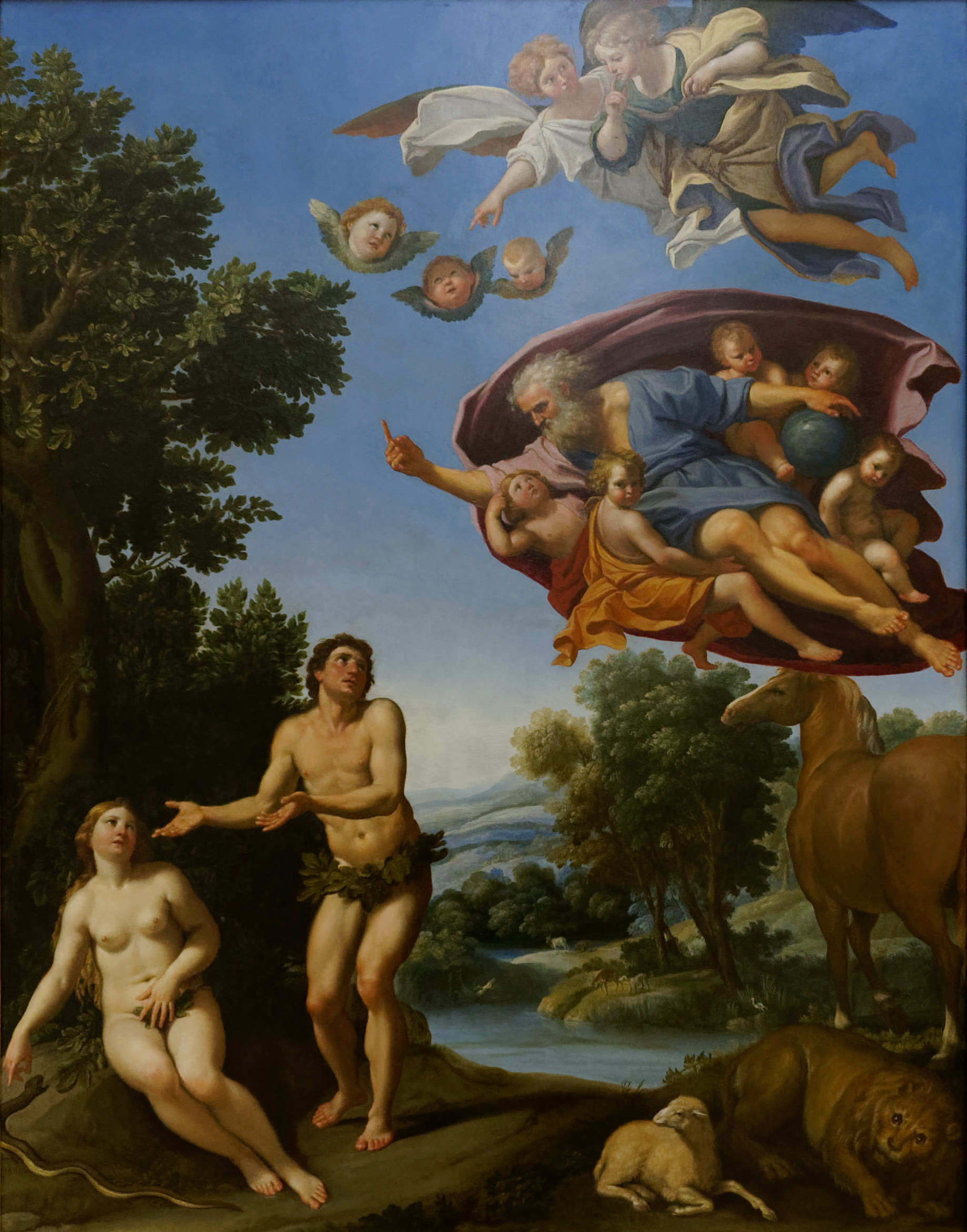 Dieu réprimandant Adam et Eve, tableau du Dominiquin